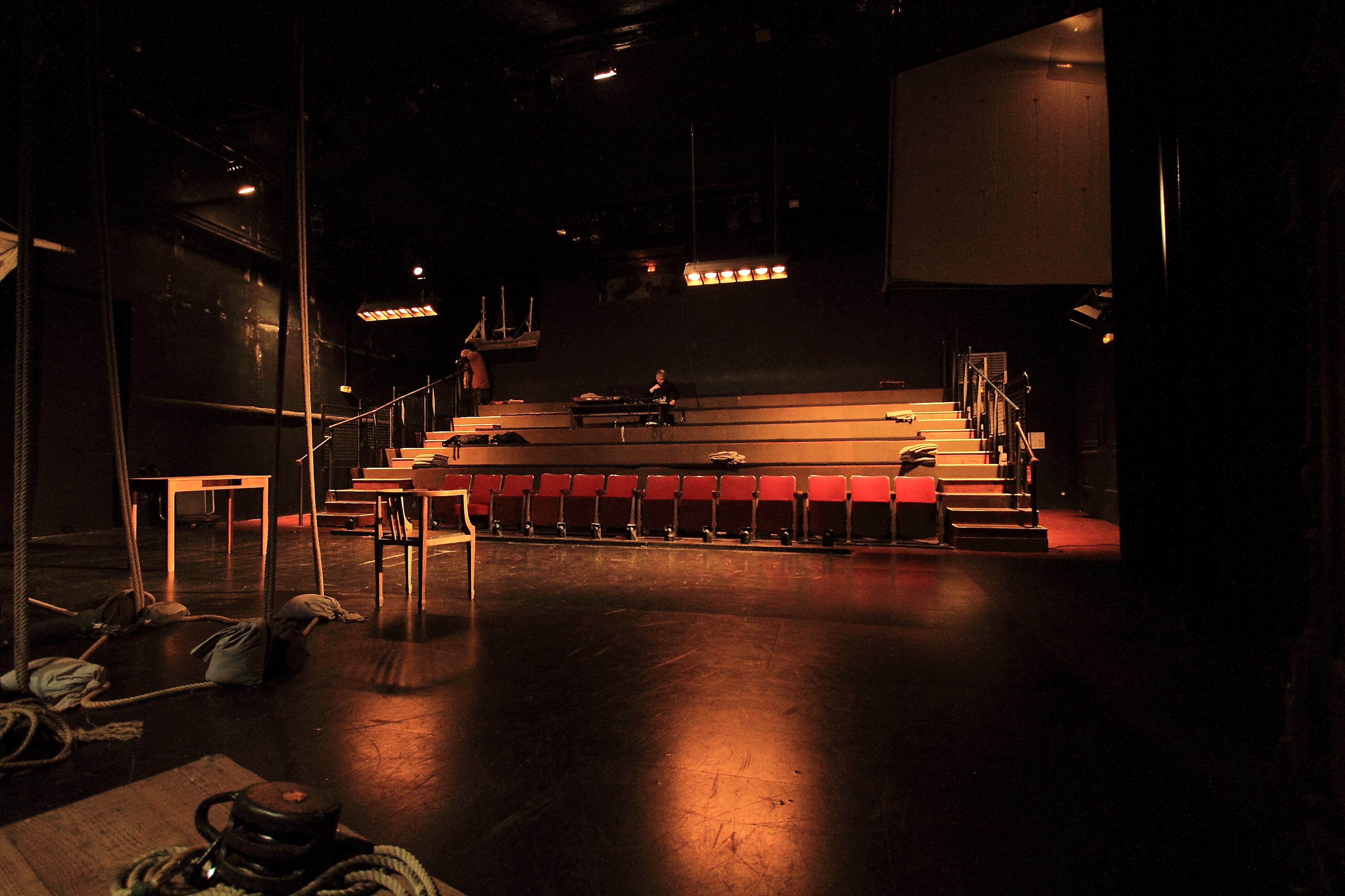 Scène, gradins et régie, janvier 2018